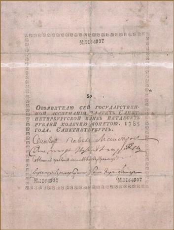 50 рублей образца 1769 года